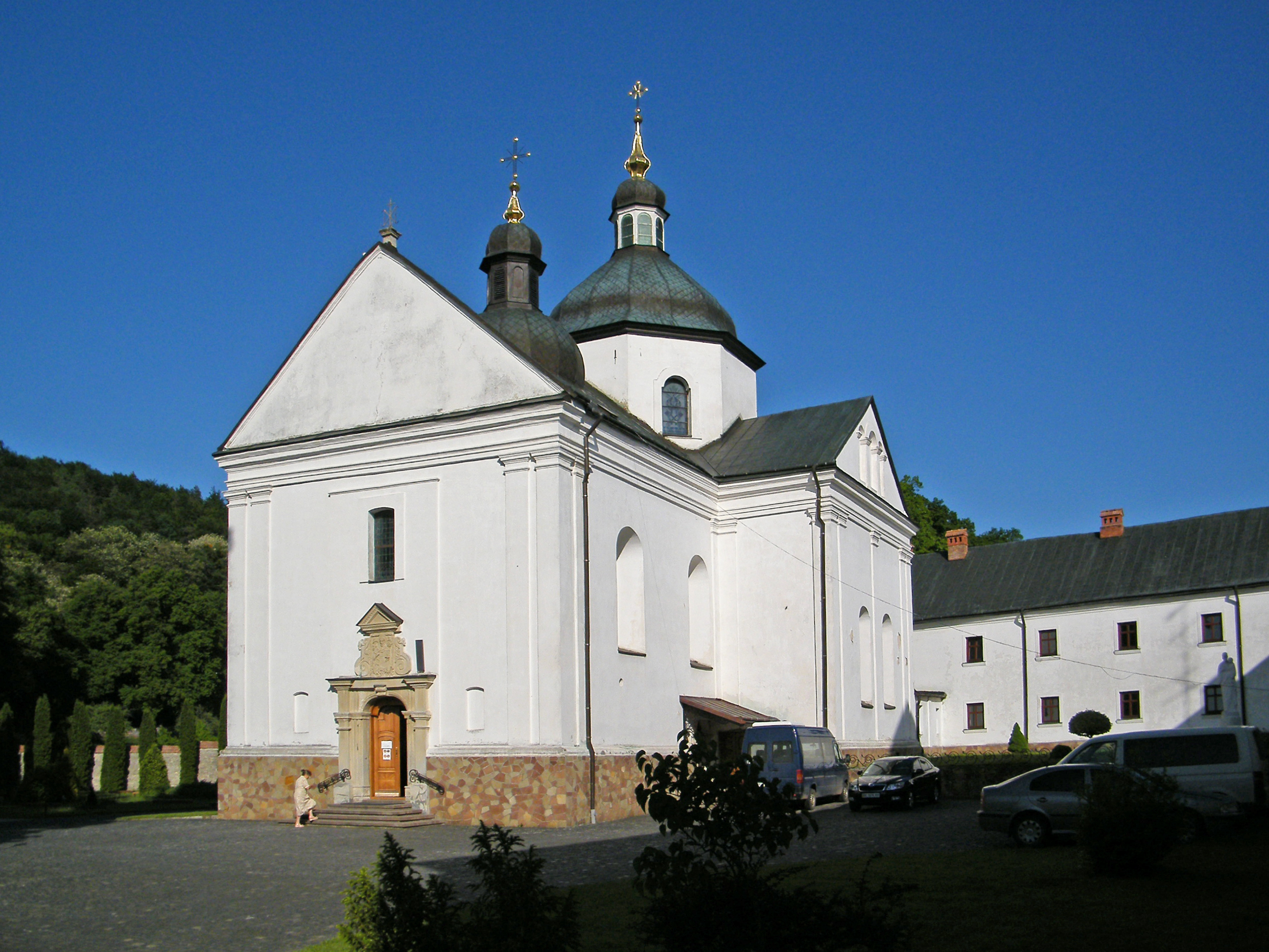 Храм Святого Николая